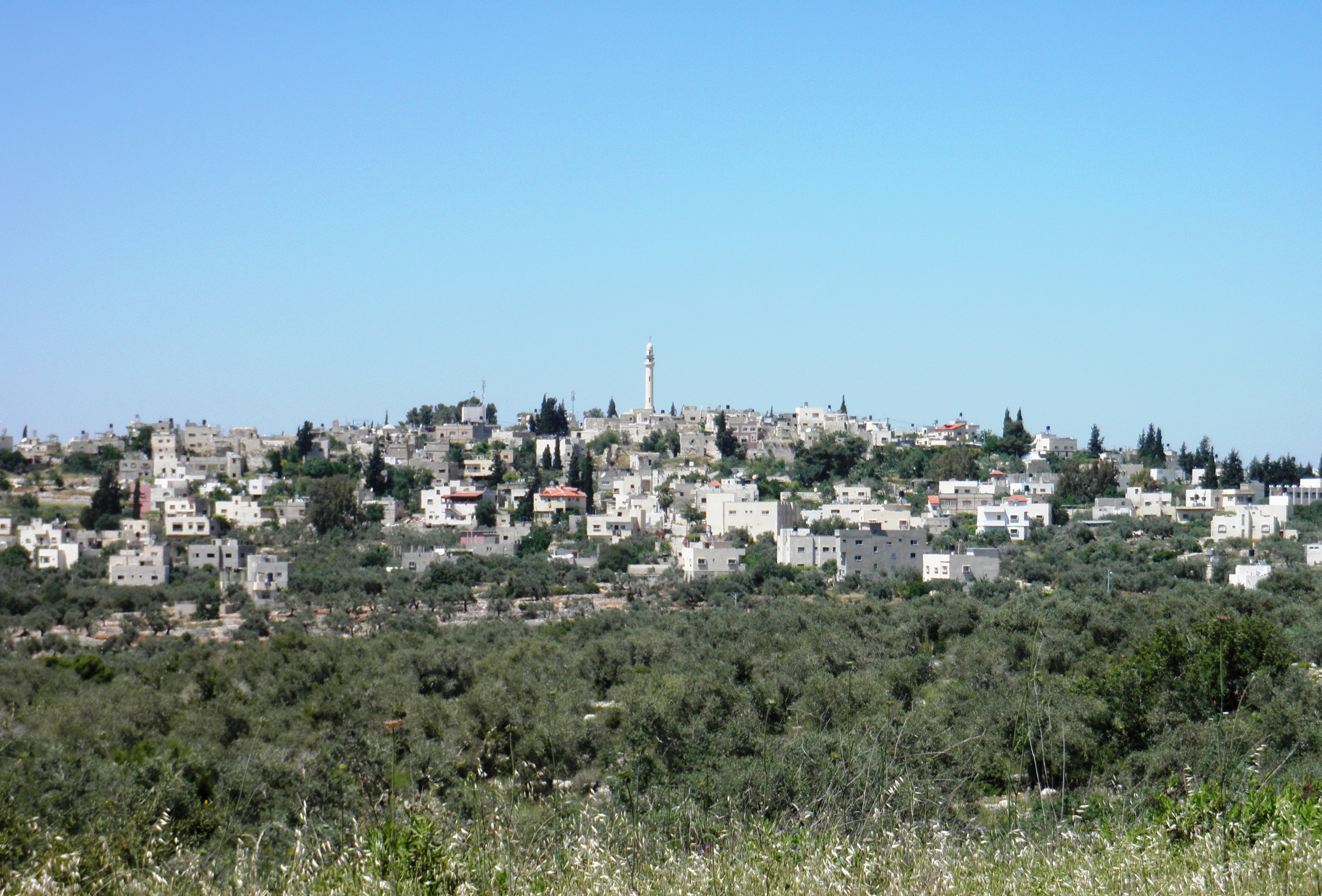 כפל חארת